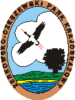 Logo Zerkowsko-Czeszewskiego Parku Krajobrazowego